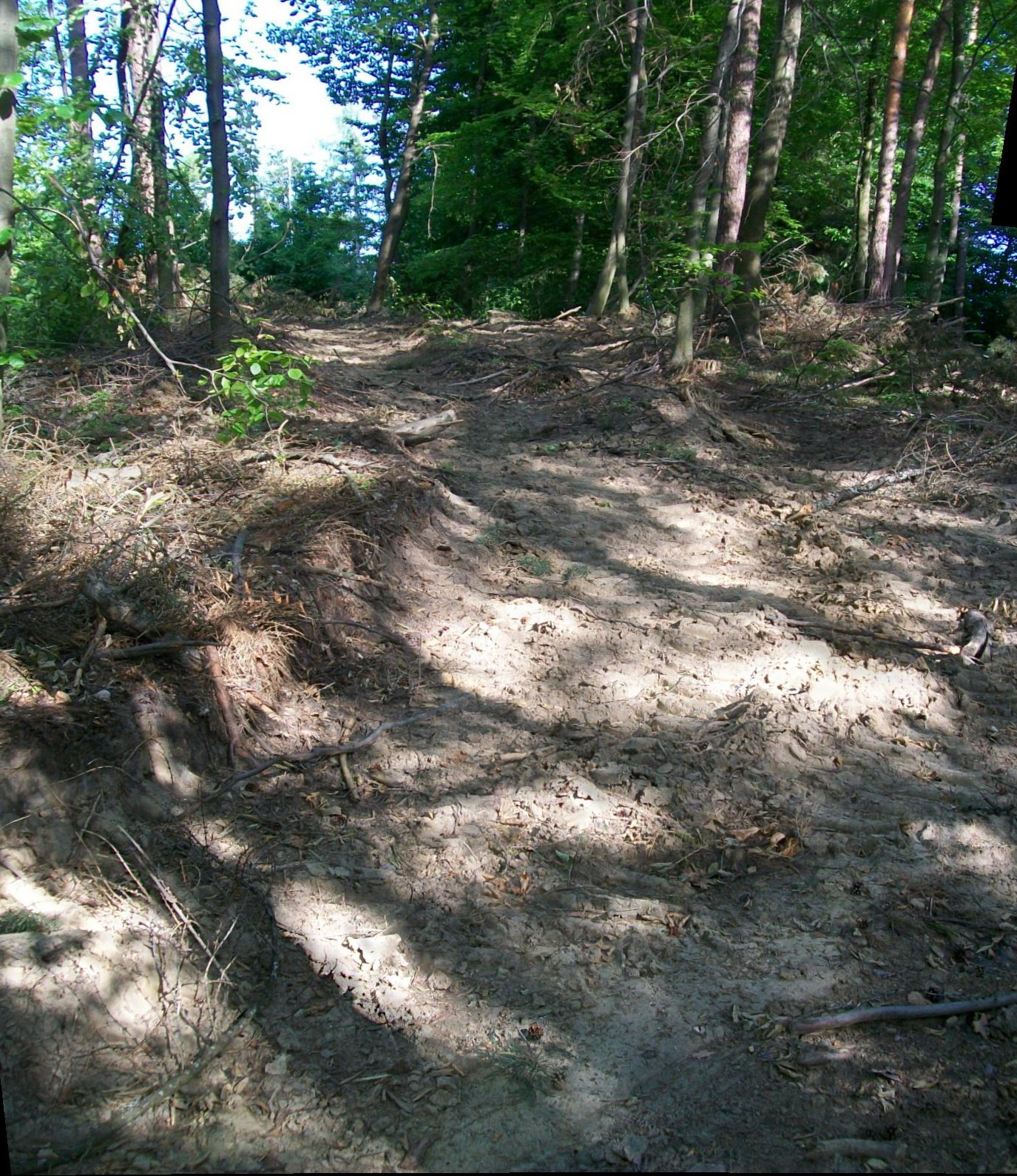 Reifenspuren eines Holzvollerntners im Wald bei Grambach